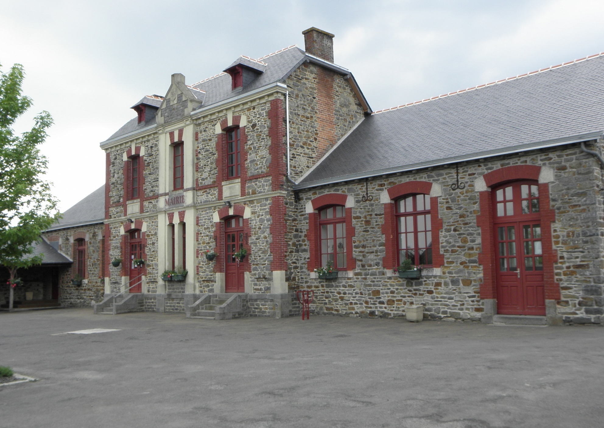 Mairie de Saint-Germain-du-Pinel (35).